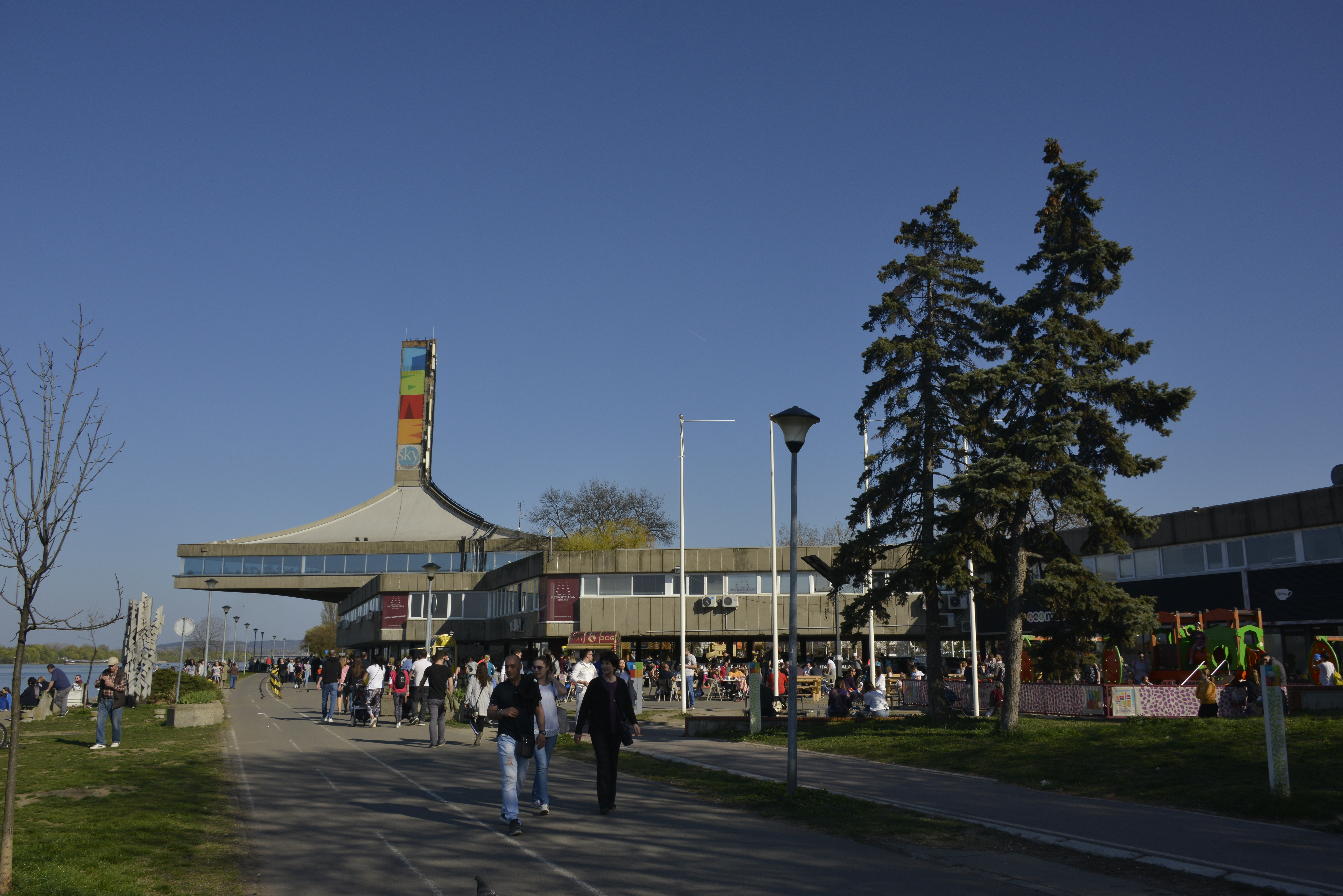 SC Milan Gale Muskatirovic